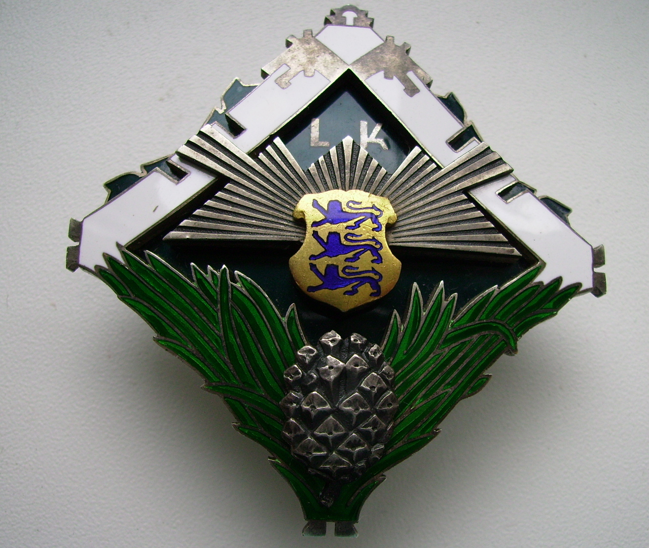 Looduskaitsemärk, 2. järk